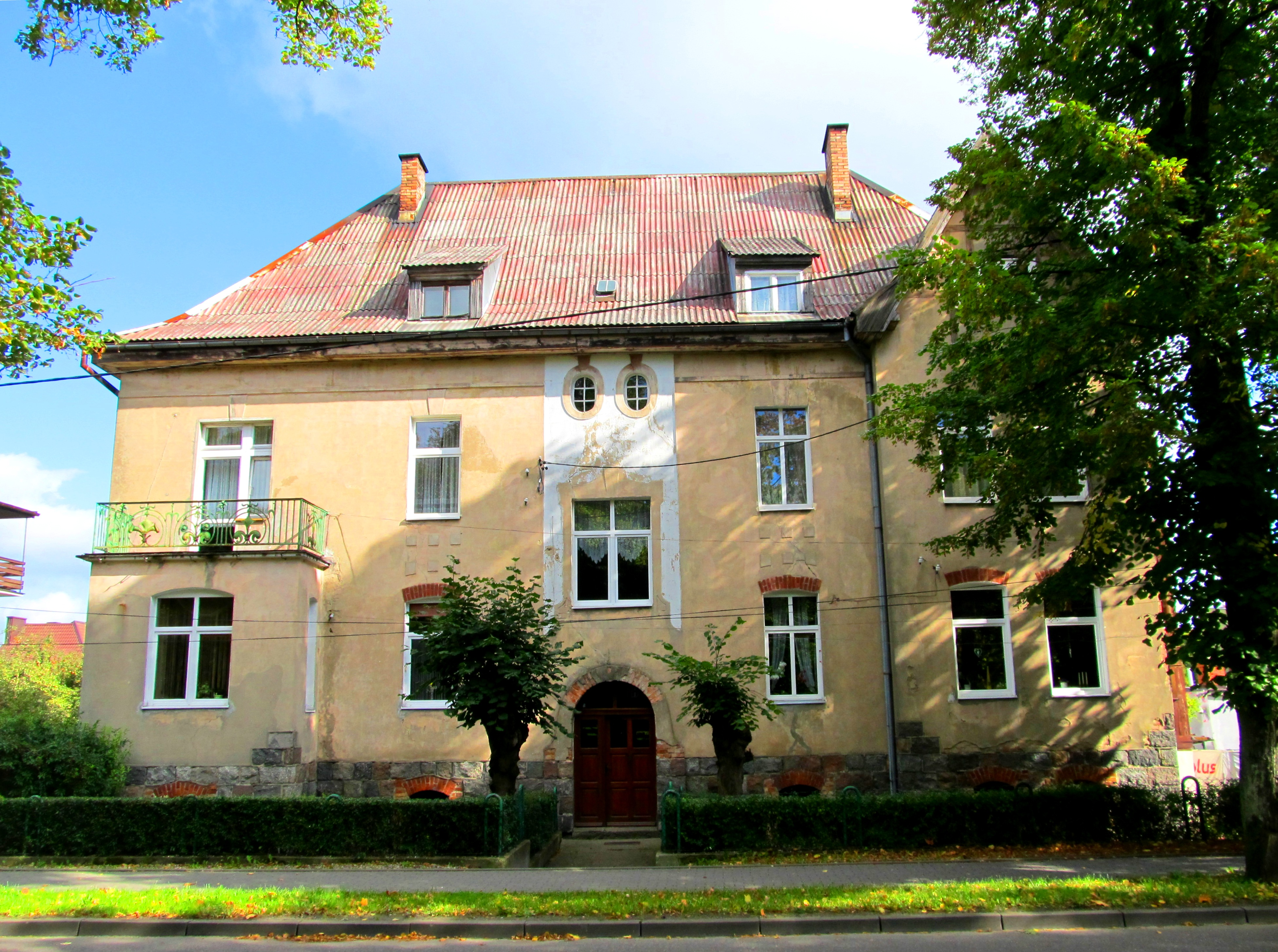 Kartuzy, ul. Majakowskiego 8 - dom Aleksandra Majkowskiego, pocz. XX